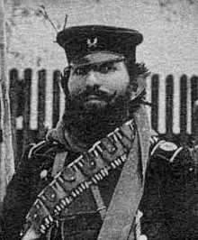 Сърбоманският войвода Йован Довезенски